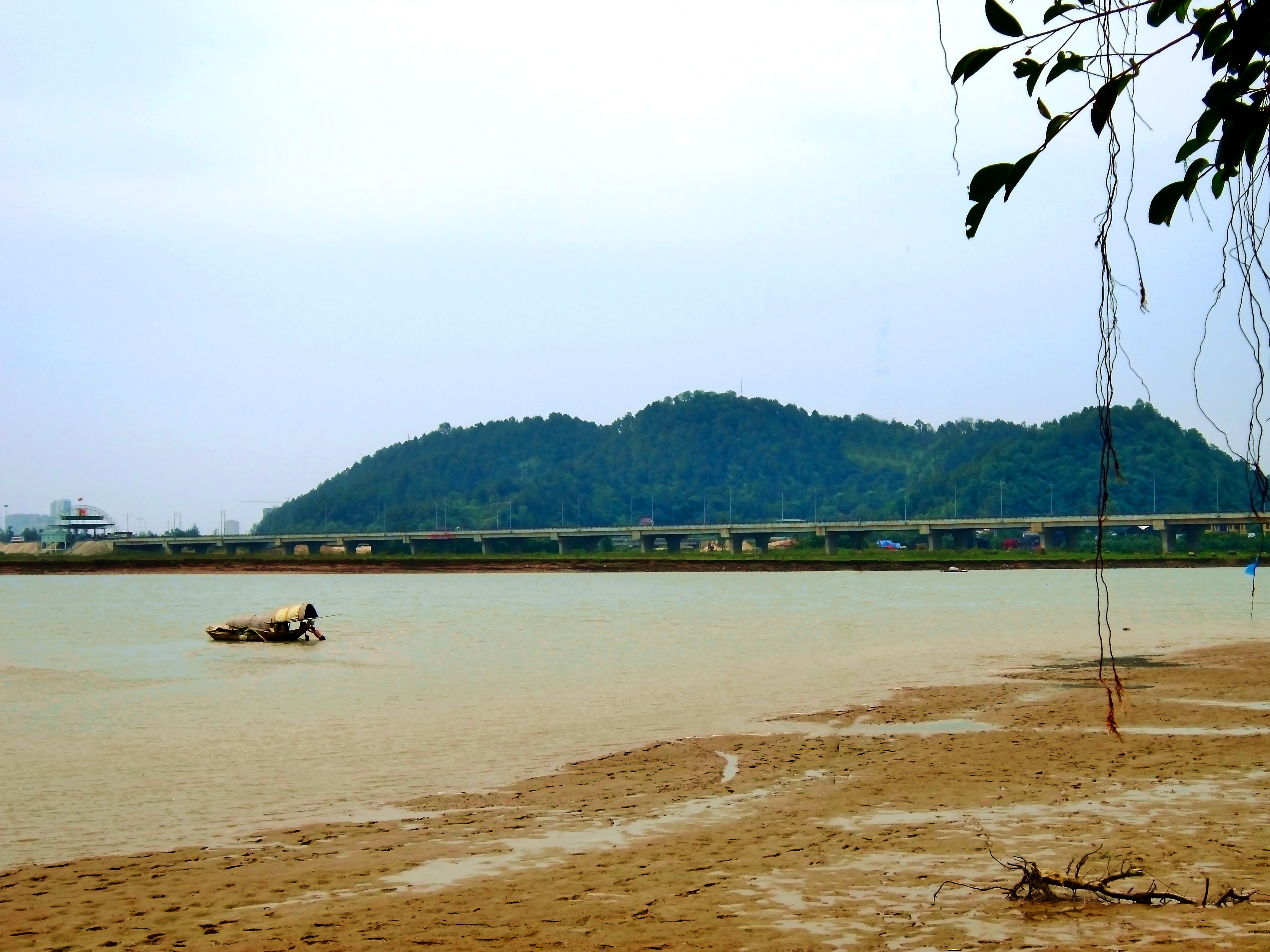 Sông Lam, đoạn gần cầu Bến Thủy 2, thuộc TP. Vinh, tỉnh Nghệ An, Việt Nam.